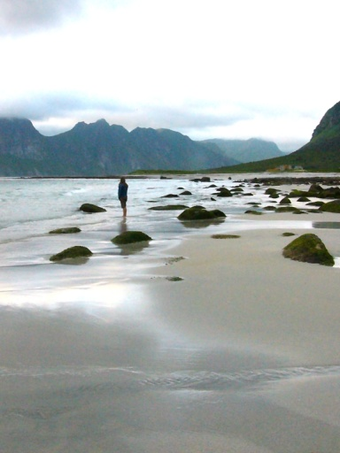 Utakleiv beach at Vestvågøy - Lofoten, Norway